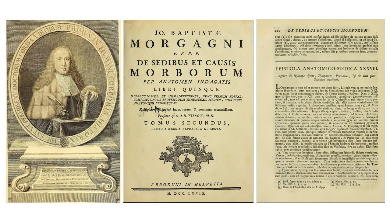 Frontespizio dell'opera De Sedibus et Causis Morborum di G.B. Morgagni